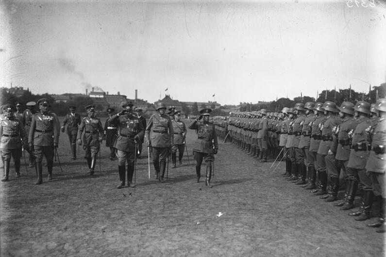 Der Generalinspekteur des argentinischen Heeres, General Toranzo besichtigt das Berliner Wacht-Regiment ! Der Generalinspekteur des argentinischen Heeres, General Toranzo (x) schreitet mit dem Chef der Heeresleitung, General Heye (xx) die Front des Wacht-Regiments ab.